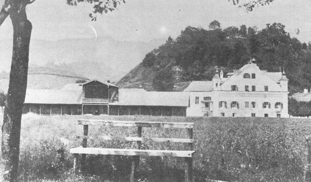 Bad Kirchberg, Fotografie um 1870. Rechts das Kirchberg-Schlössl, angeschlossen das hölzerne Badehaus. Im Hintergrund der Kirchberg-Felsen.